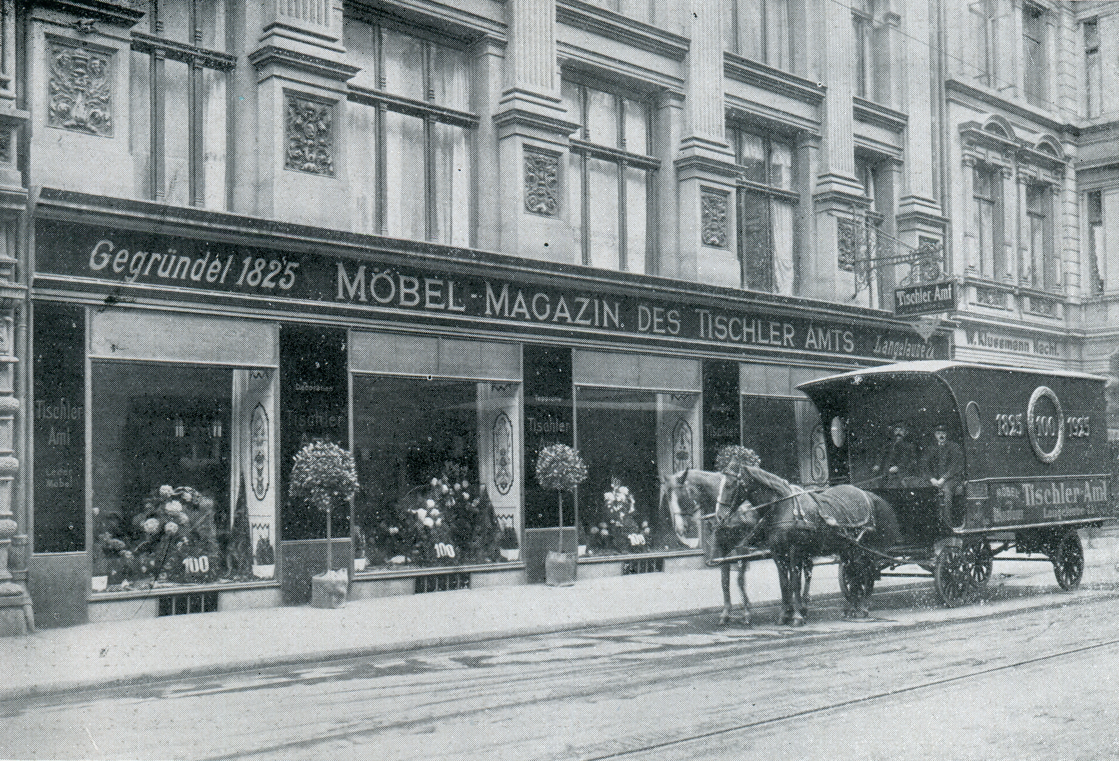 Blick auf das von dem Architekten Albrecht Haupt entworfenen Geschäftshauses für das „Möbel-Magazin des Tischler-Amts“ in Hannover, Lange Laube 7A. Zum 100sten Gründungsjubiläum und anlässlich einer Foto-Dokumentation ist hier ein mit zwei Pferden bespanntes Kutschgefährt mit zwei Kutschern vor das Haus vorgefahren. Im Hintergrund ist der Schriftzug für die Hofpianofortehandlung von W. Klussmann Nachfolger zu erkennen, im Vordergrund die Gleise der hannoverschen Straßenbahn ...